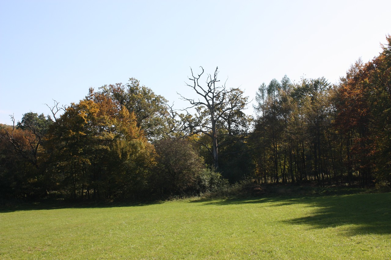 Okšovské duby 001